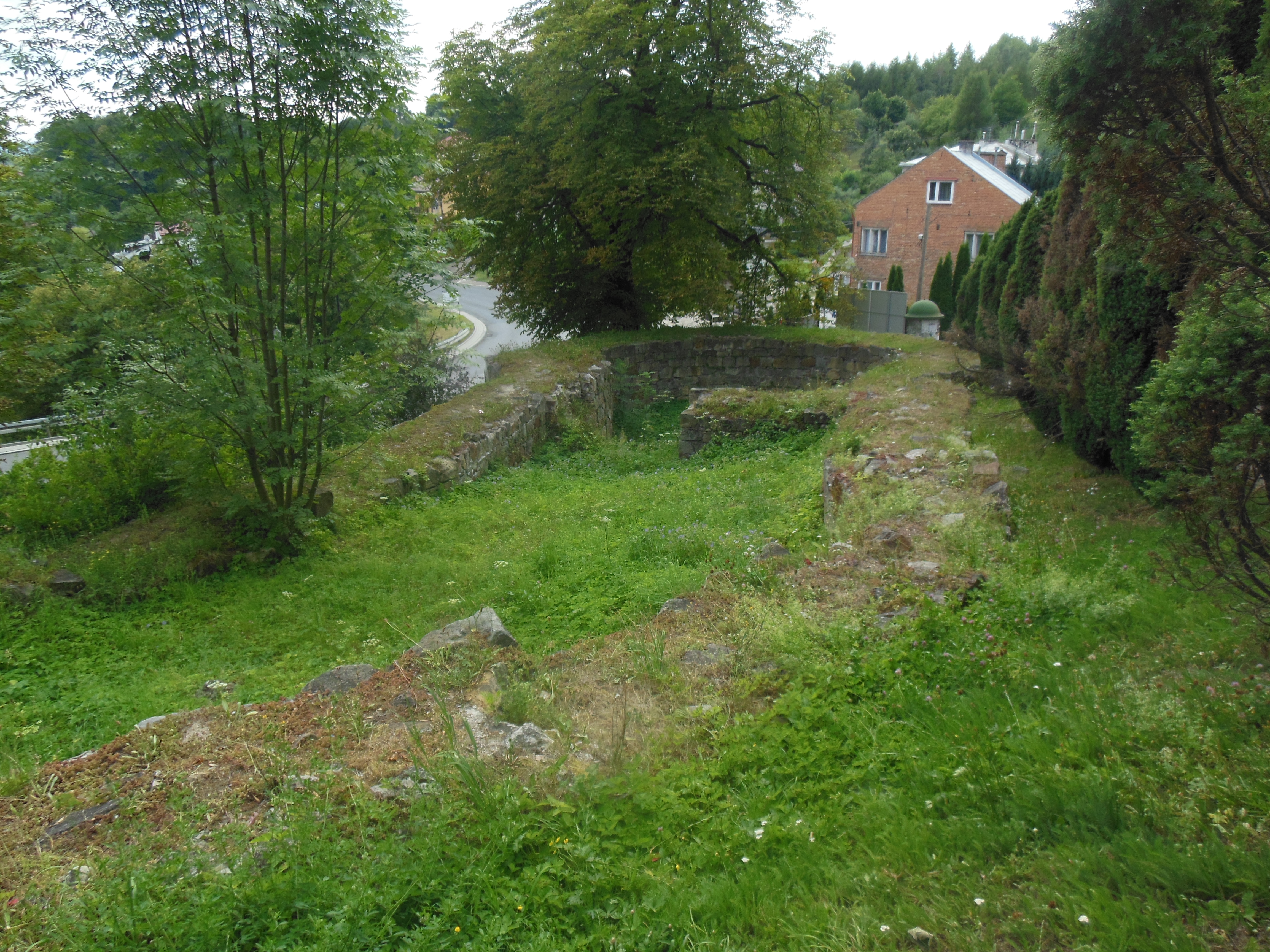 Ruiny Barbakanu w Bieczu (woj. Małopolskie)